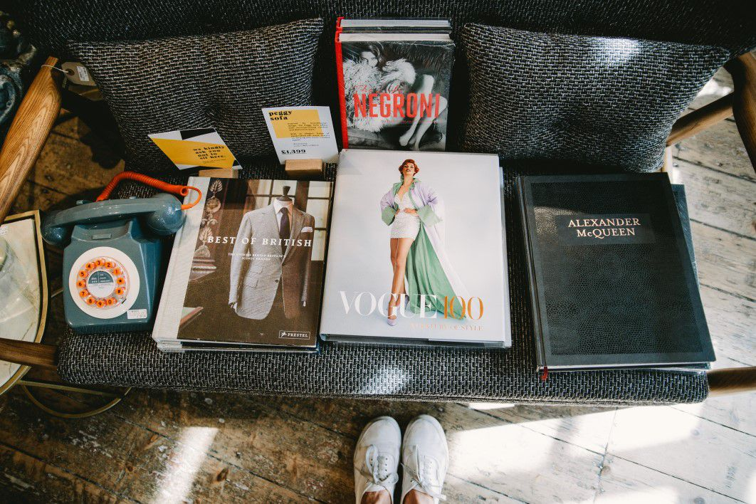 vogue magazine